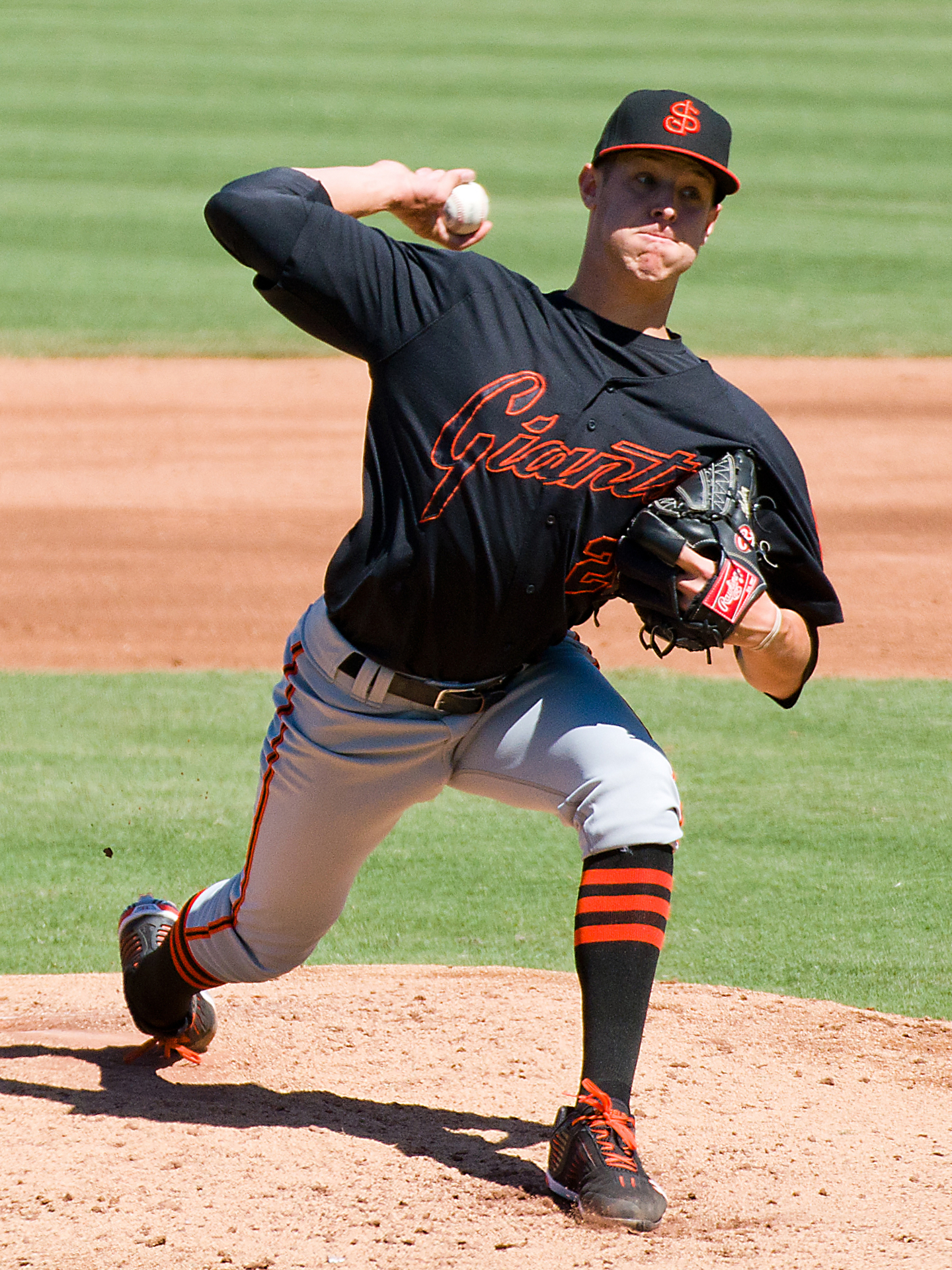 Zack Wheeler